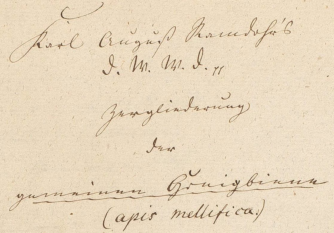 Karl August Ramdohr, Zergliederung der gemeinen Honigbiene (um 1811, Manuskript für Pastor Hoffmeister in Wienrode), Titel